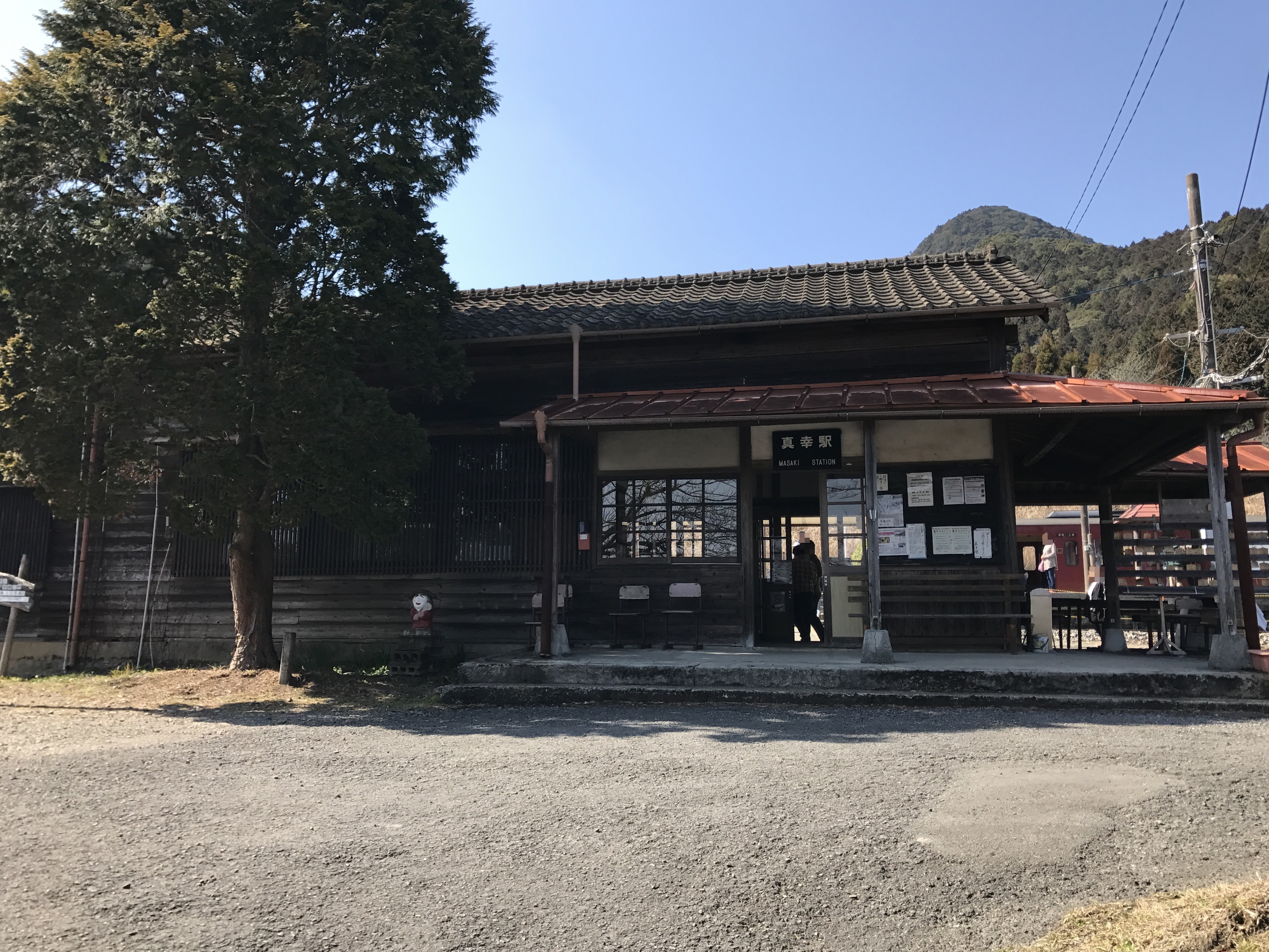 真幸駅駅舎